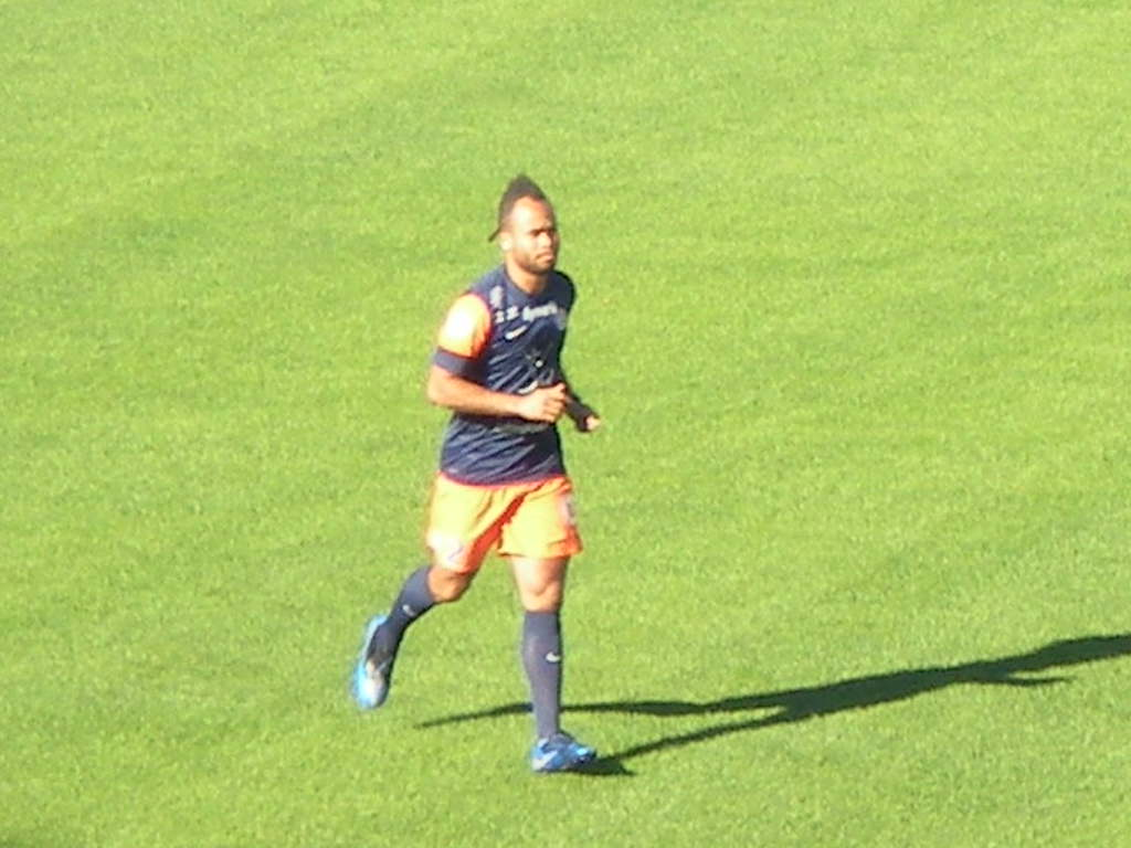 Gary Bocaly